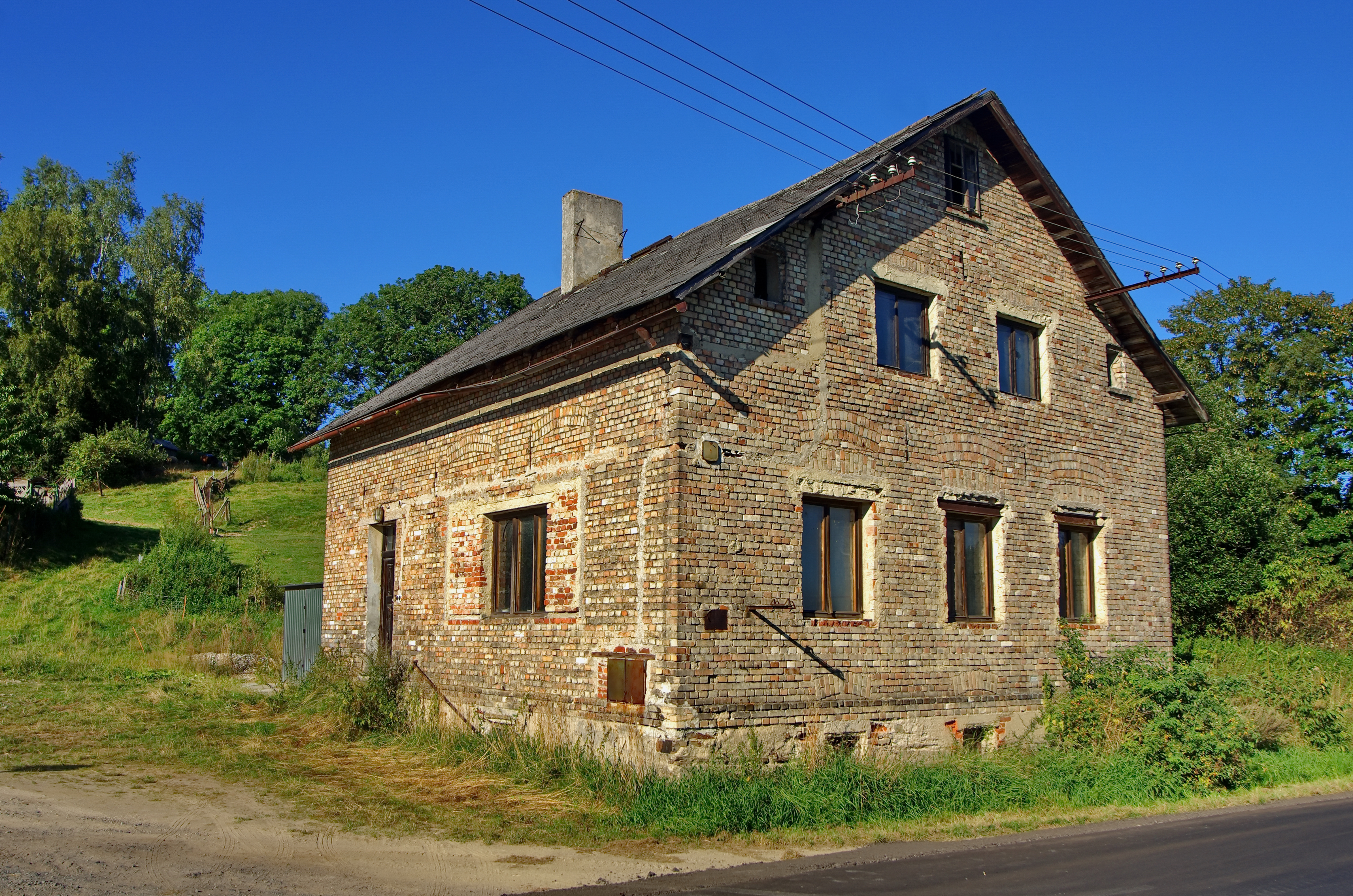 Čirá - část Kraslic, okres Sokolov